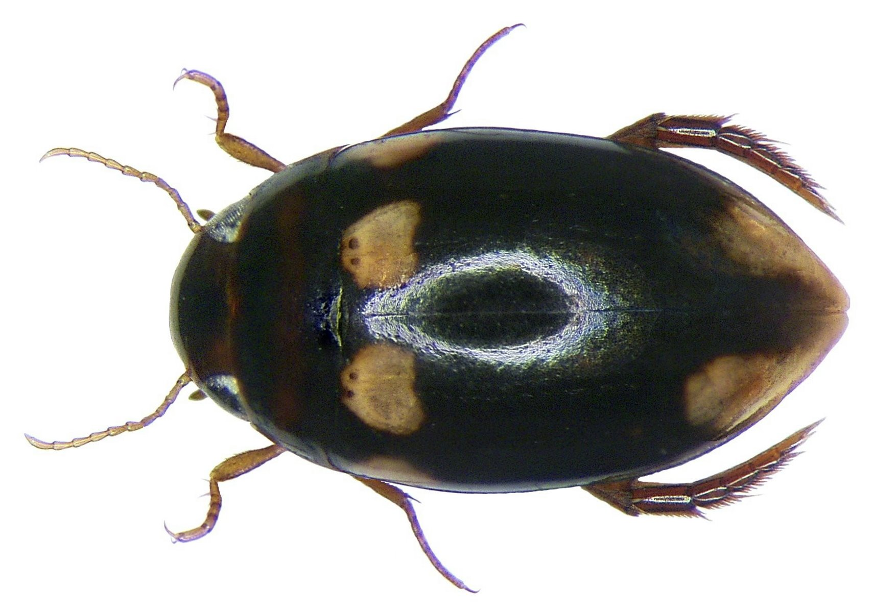 Neptosternus schoedli Hendrich & Balke, 1997 Familie: Dytiscidae Groesse: 3 mm Fundort: Indonesien, Sulawesi, Sawangan, 280 m leg. A.Skale, 2004; det. Hendrich Photo: U.Schmidt, 2006